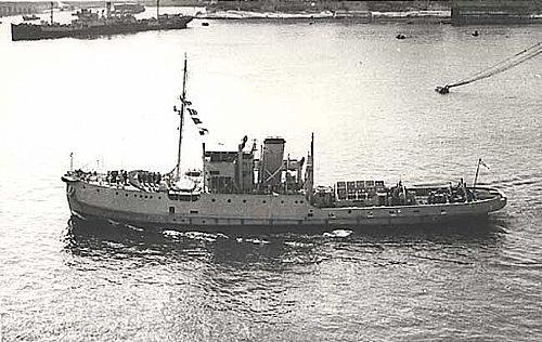 Der Bergungsschlepper HMS Brigand (W83)